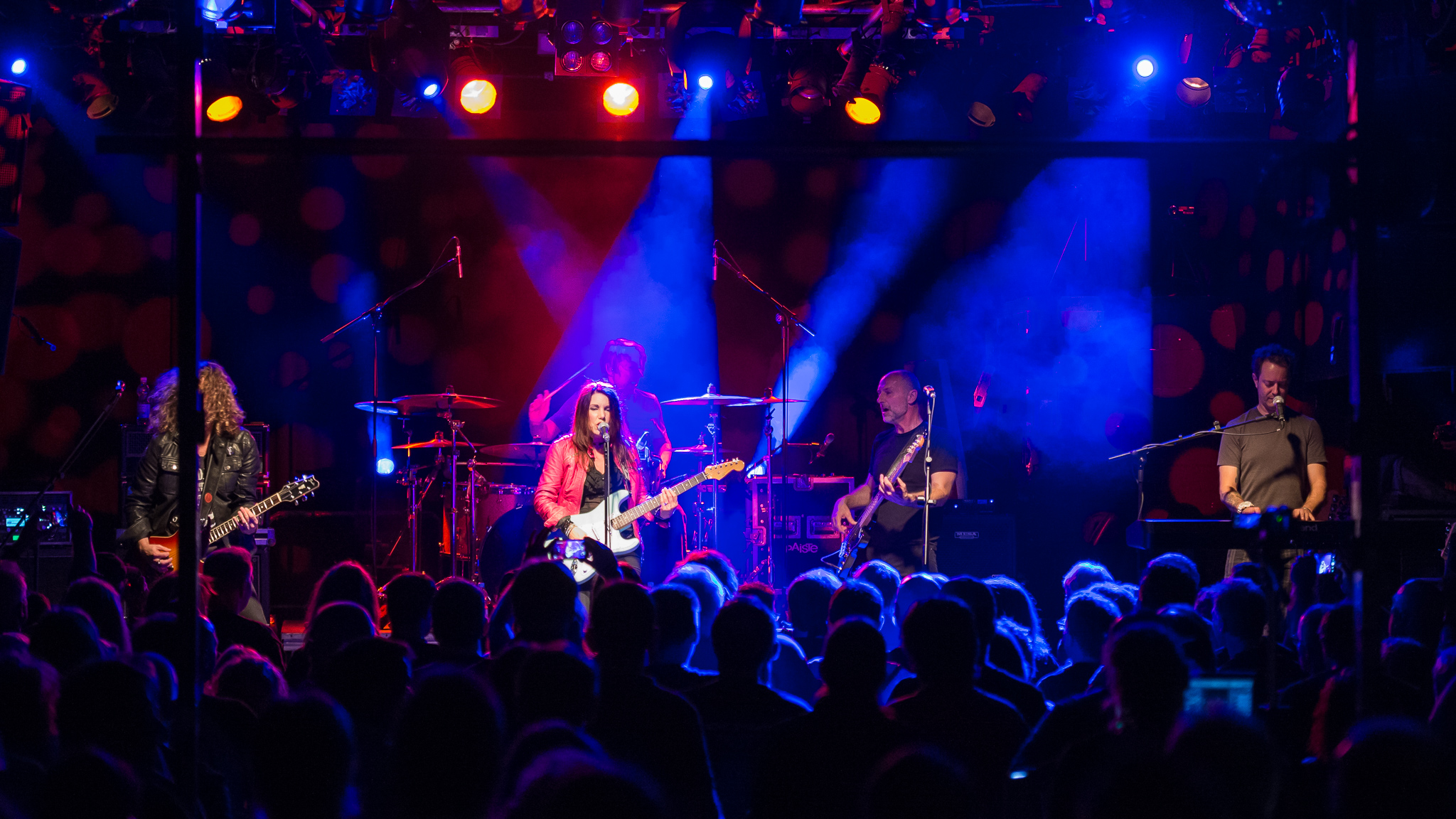 Concertbüro Franken,Der Hirsch,Konzert,Lee Aaron,Livekonzert,Livemusik,Musik